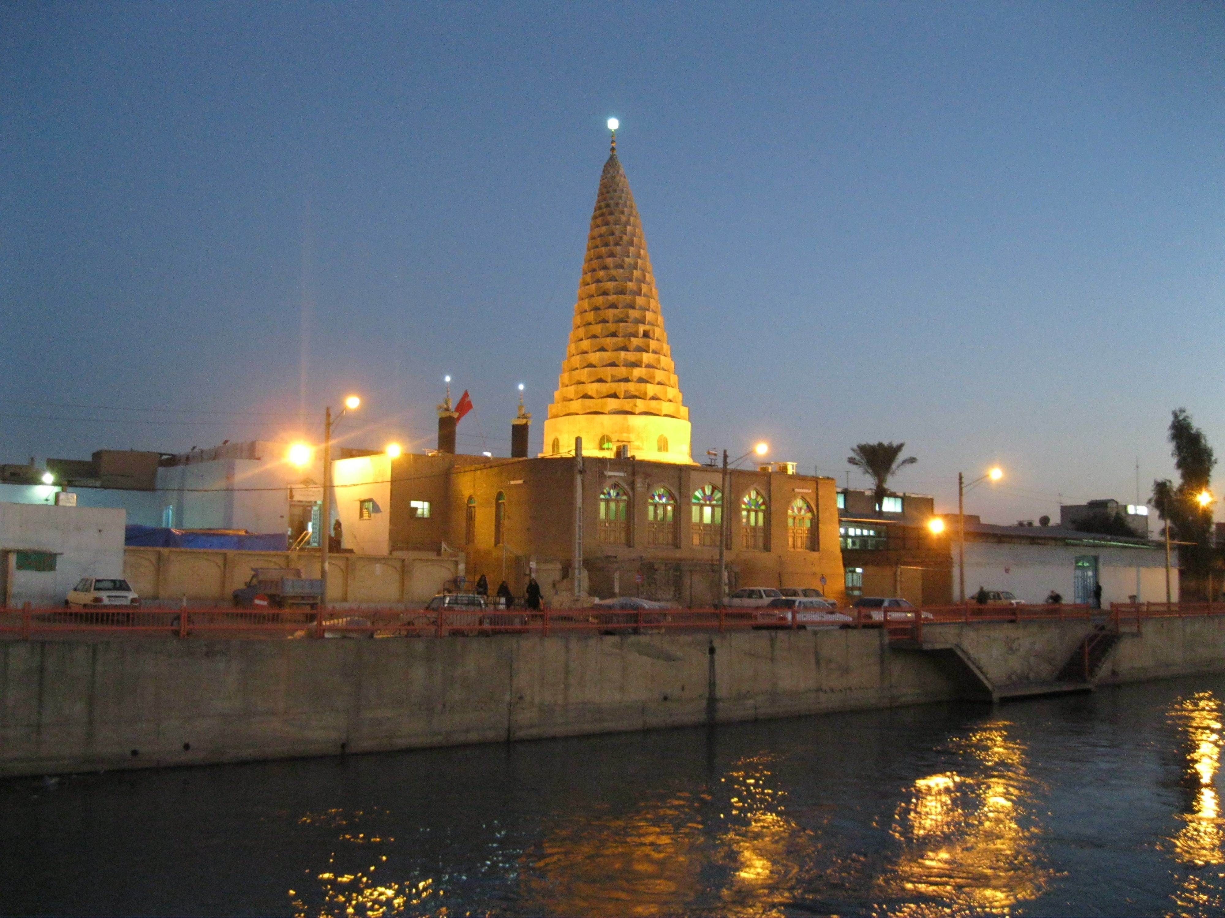 آرامگاه دانیال نبی واقع در شوش